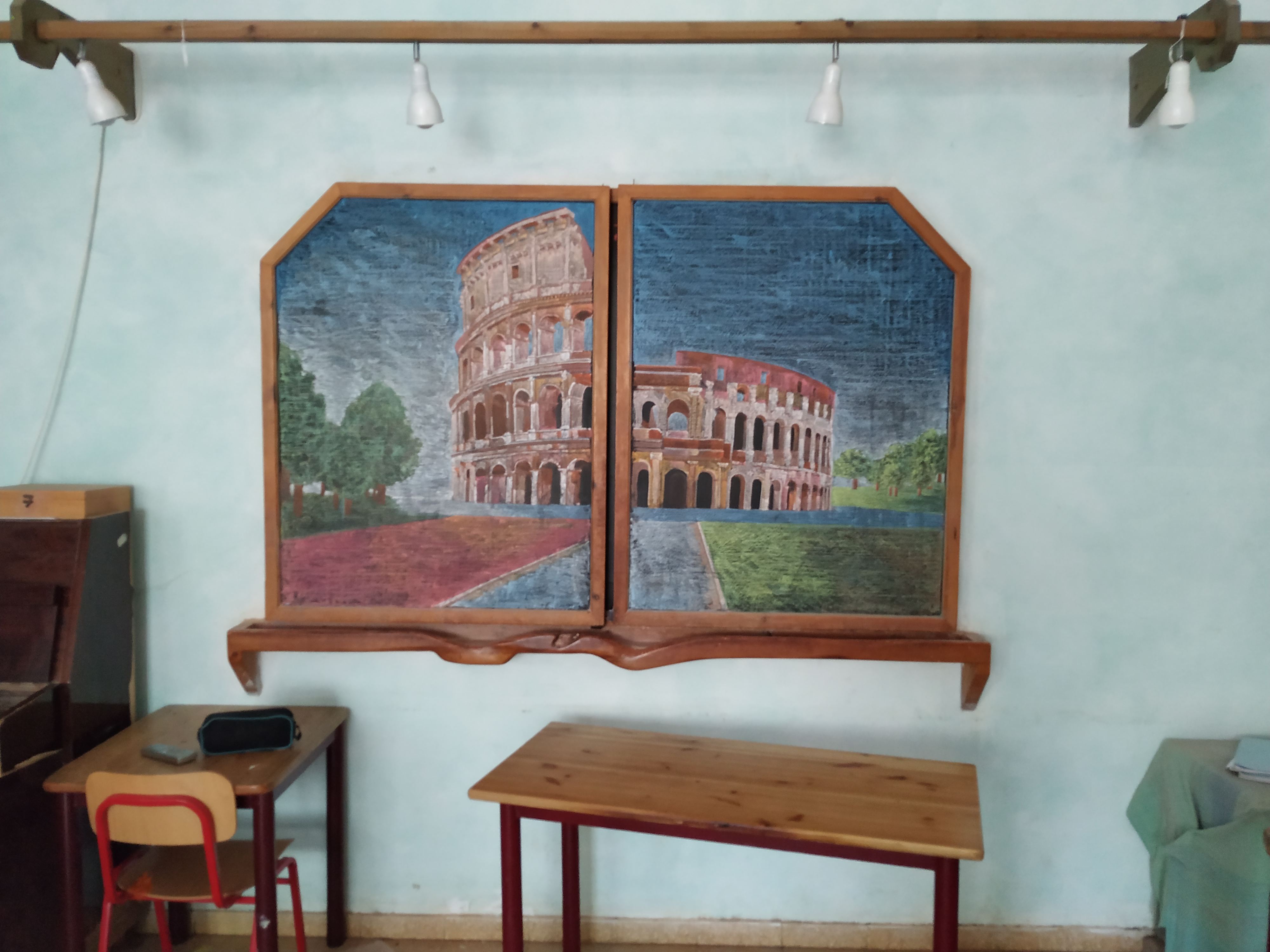 לוח בכיתת לימוד אנתרופוסופי המשלבת אמנות, היסטוריה, מוסיקה ועוד...